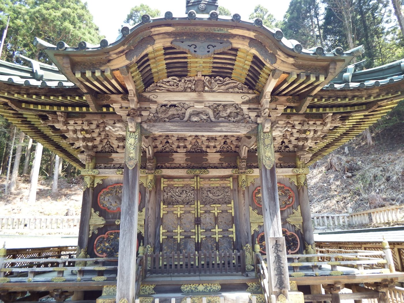 高野山 徳川家霊台 家康公